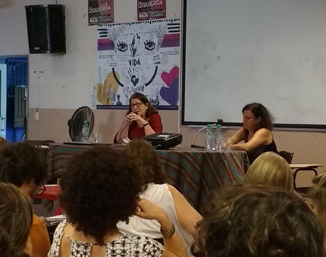 Fotografia realizada durante una charla que dio Elsie Rockwell en Filosofia y Letras UBA